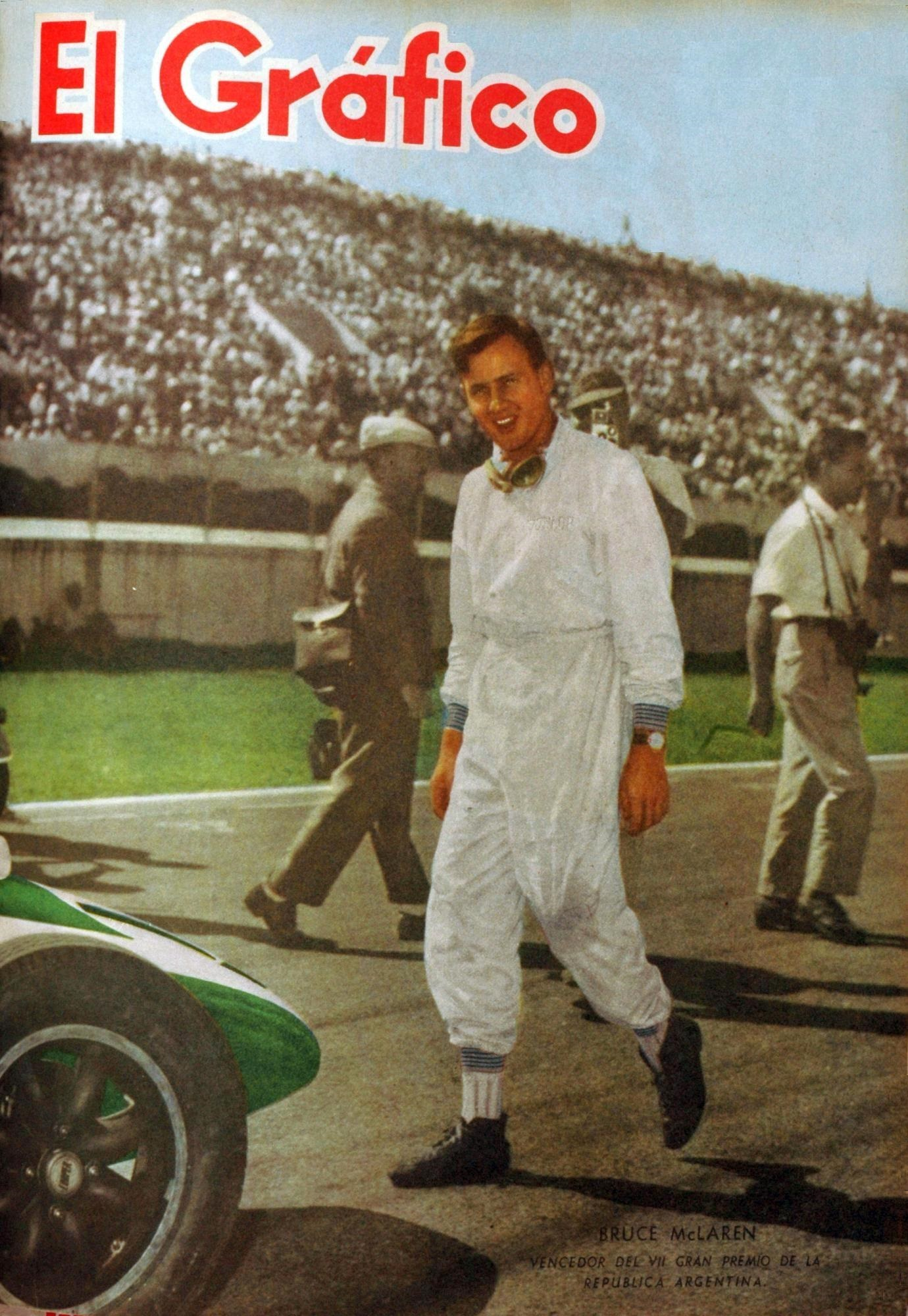 El Grafico del 17 de Febrero de 1960. Edicion 2108